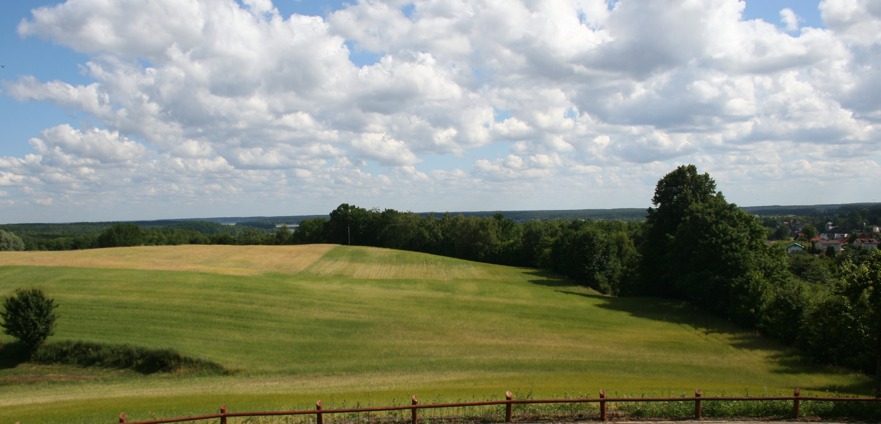 Zaborski Park Krajobrazowy, wysoczyna morenowa - widok z DW 212 przy wylocie z miejscowości Charzykowy